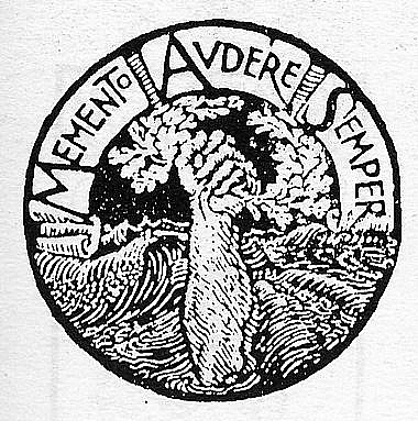 Motto dannunziano, Memento audere semper